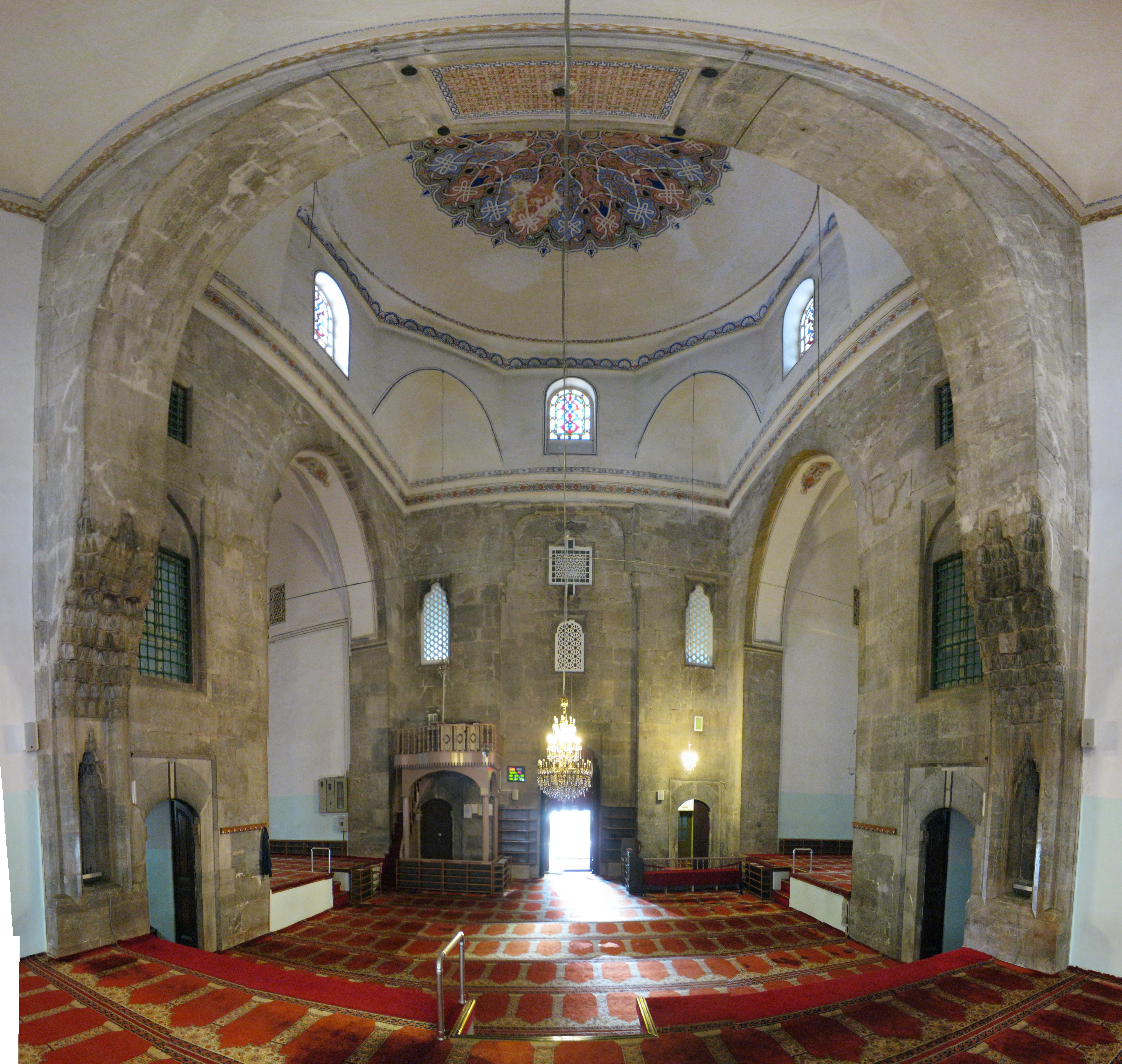 Yıldırım Bayezid Camii Bursa